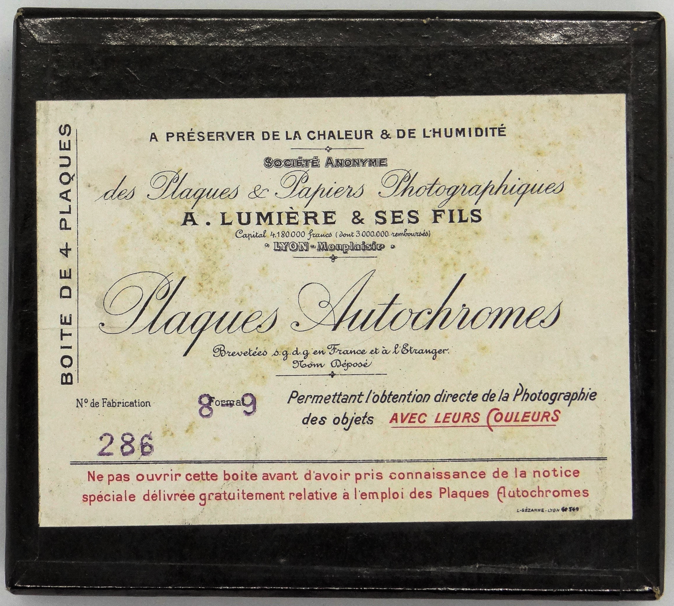 Boîte 4 de plaques autochromes. Numéro de fabrication 286 et format 8-9. Commercialisée au début XXe siècle par la société Lumière « société anonyme des plaques et papiers photographiques Antoine Lumière et ses fils ».